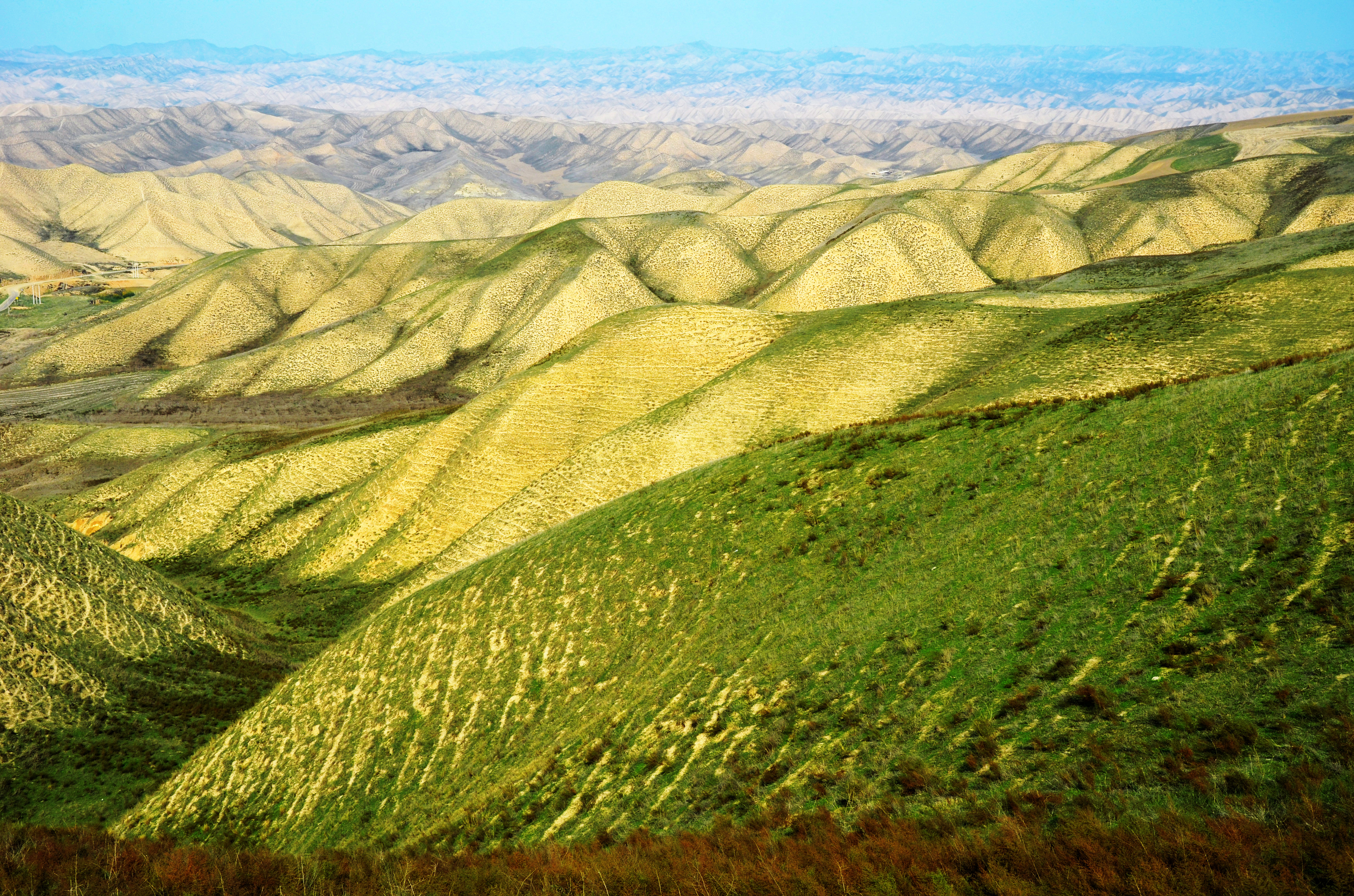 Golestan - Torkaman Sahra